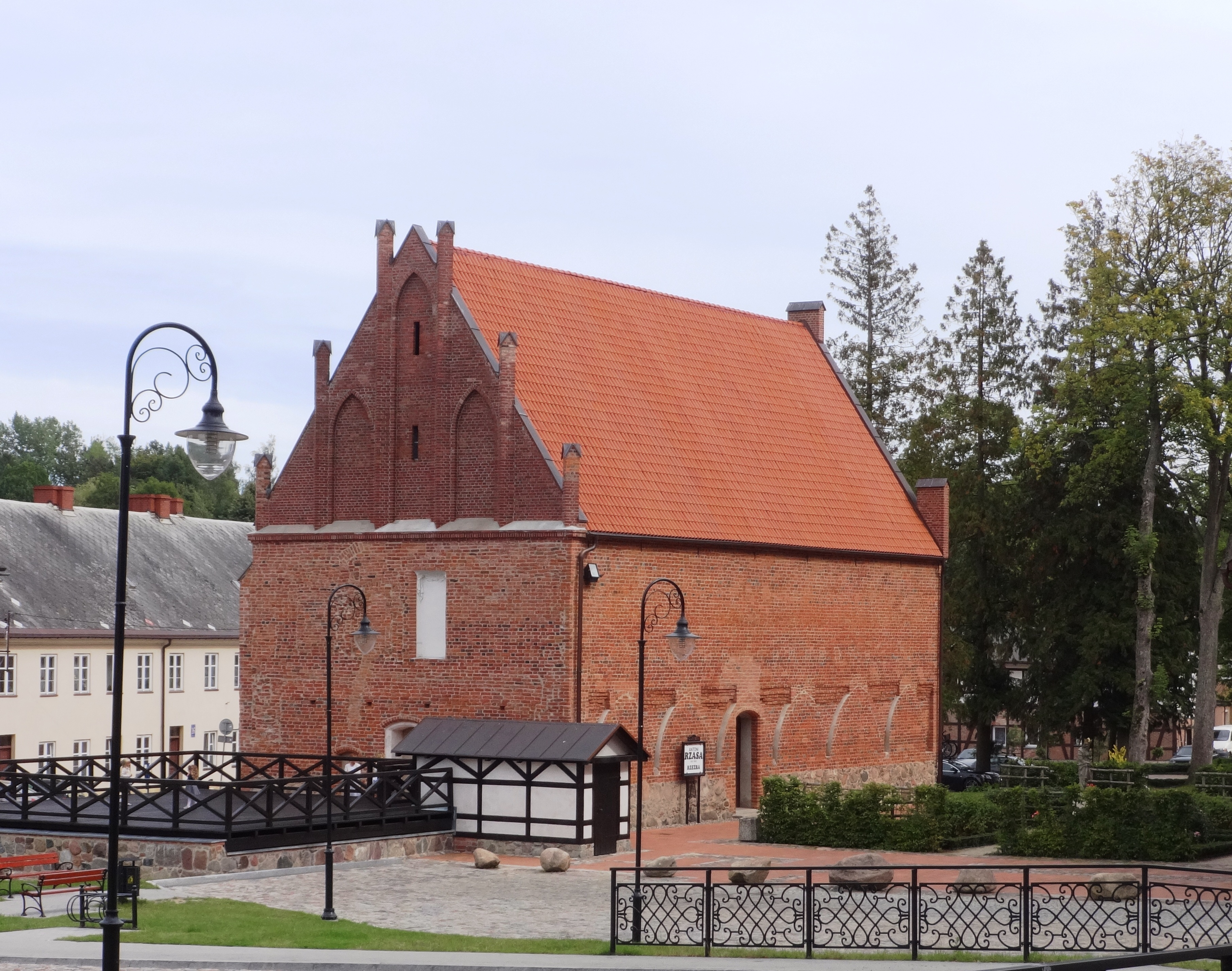 Kartuzy, refektarz, ob. sala parafialna, XIV/XV